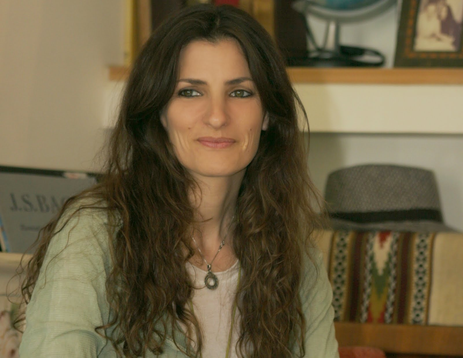 תמר גלעדי 2012